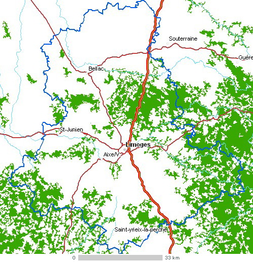 Carte du département Haute-Vienne Légende